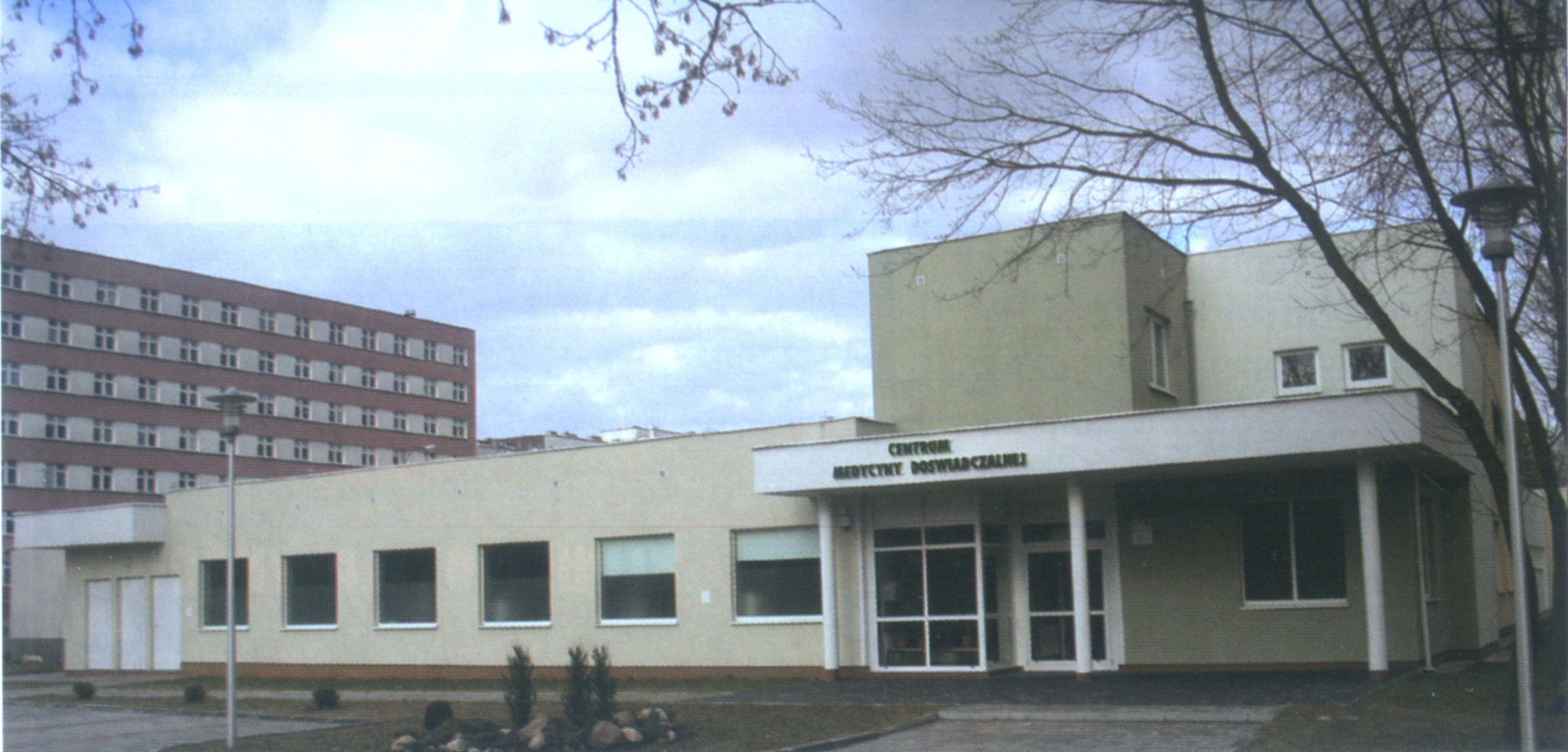 Centrum Medycyny Doświadczalnej Uniwersytetu Medycznego w Białymstoku